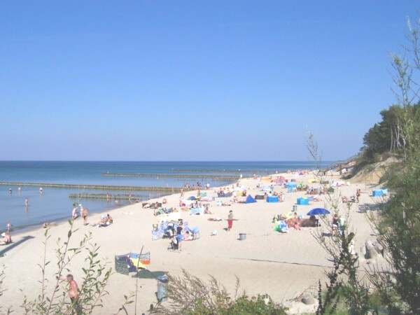 Plaża na wschód od Ustronia